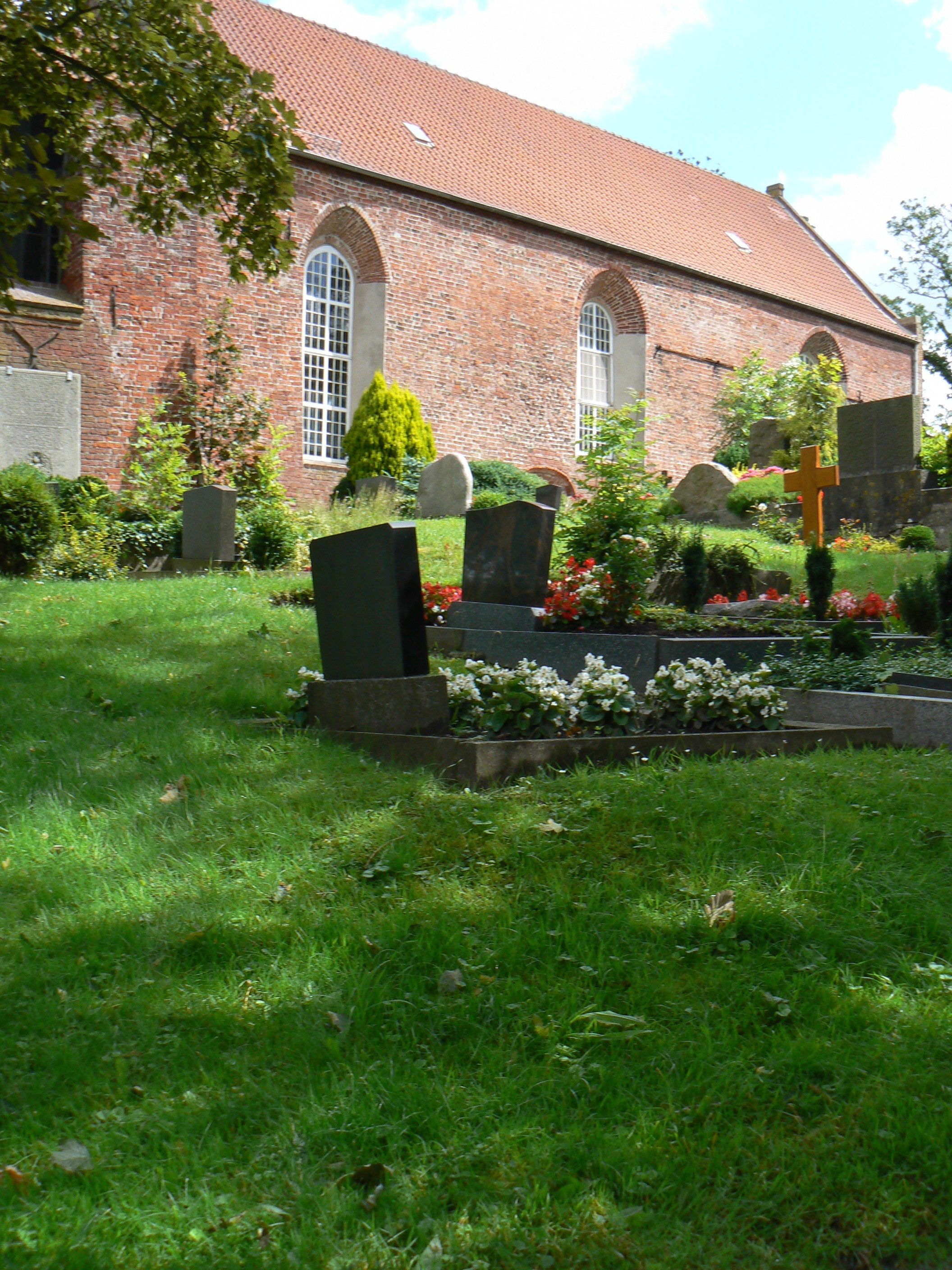 Kirche Funnix Germany